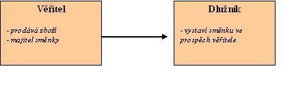 dle zápisků ze střední školy